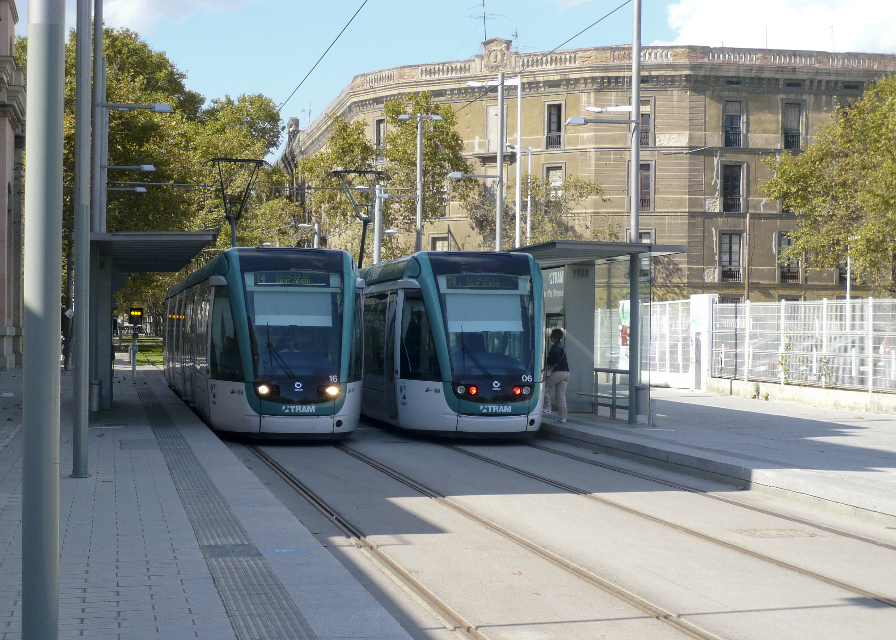 Barcelona Trams